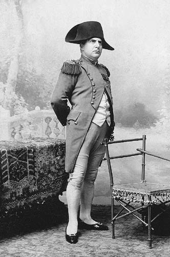 Victorien Sardou: Szókimondó asszonyság. Népszínház, 1894